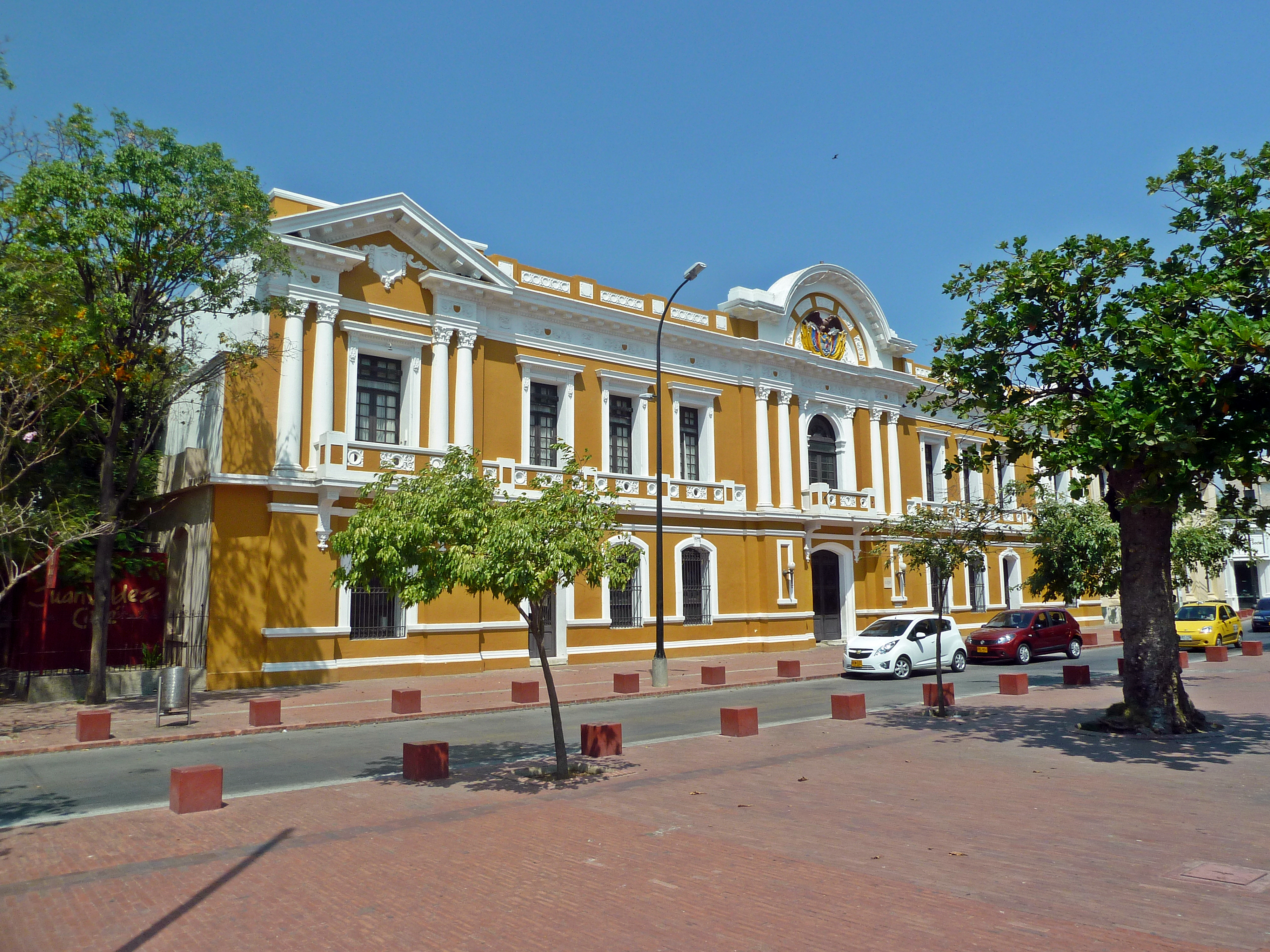 Alcaldía de Santa Marta.